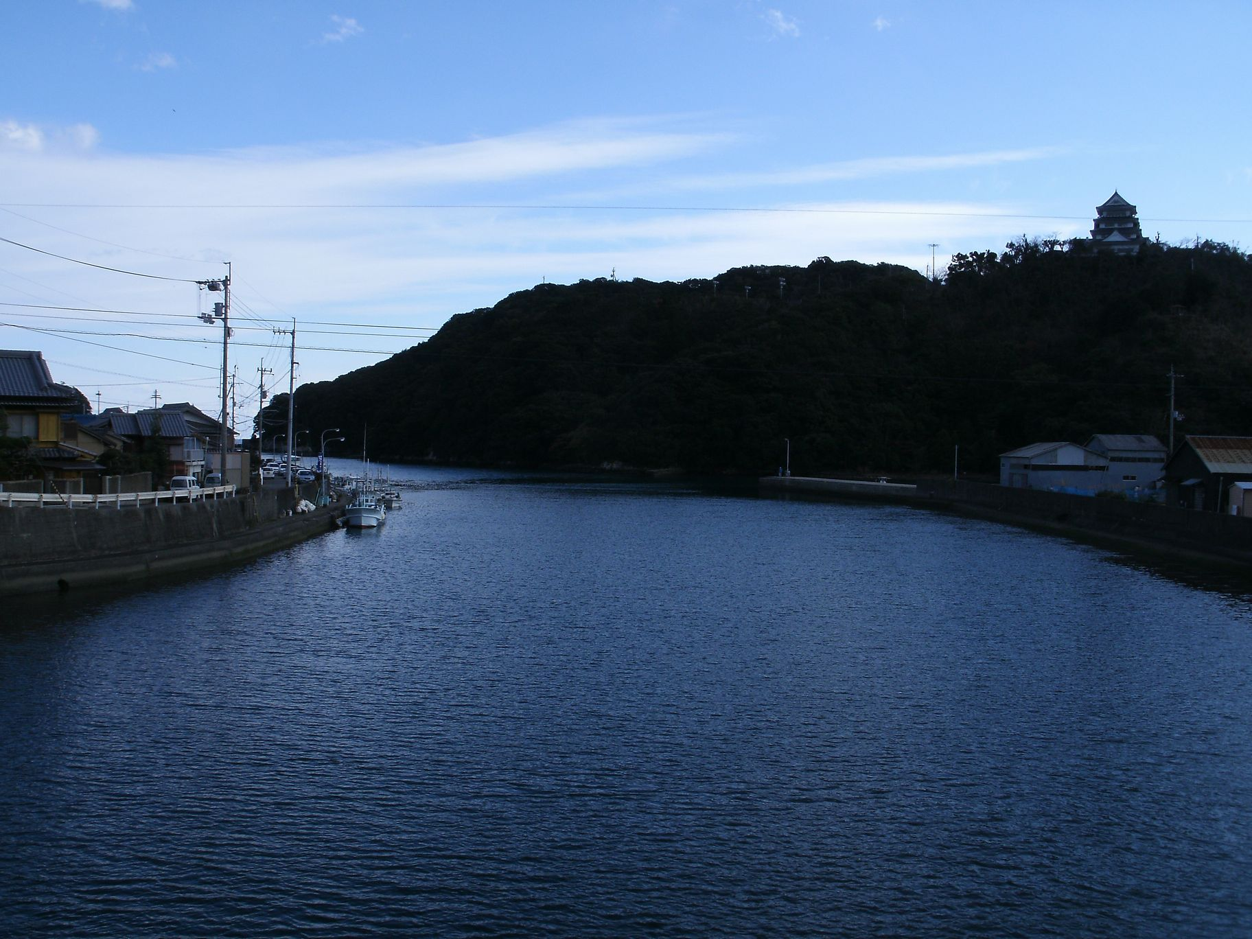 日和佐川 厄除橋から東望